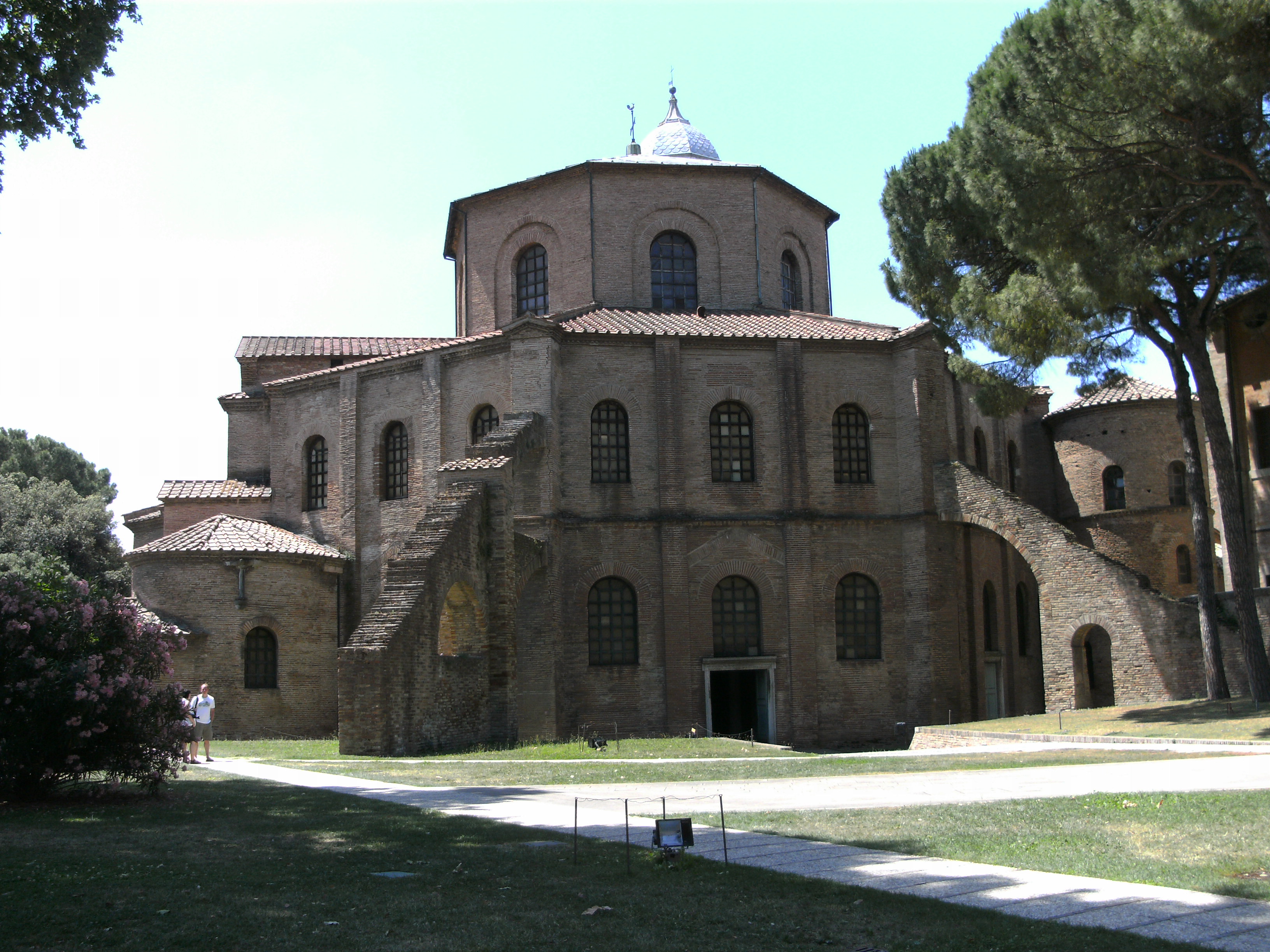 Basilika S. Vitale